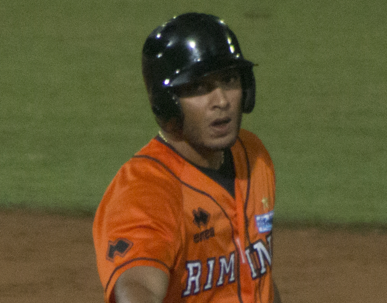 Alex Romero nella semifinale IBL 2013 disputata tra il Rimini Baseball e il Nettuno.